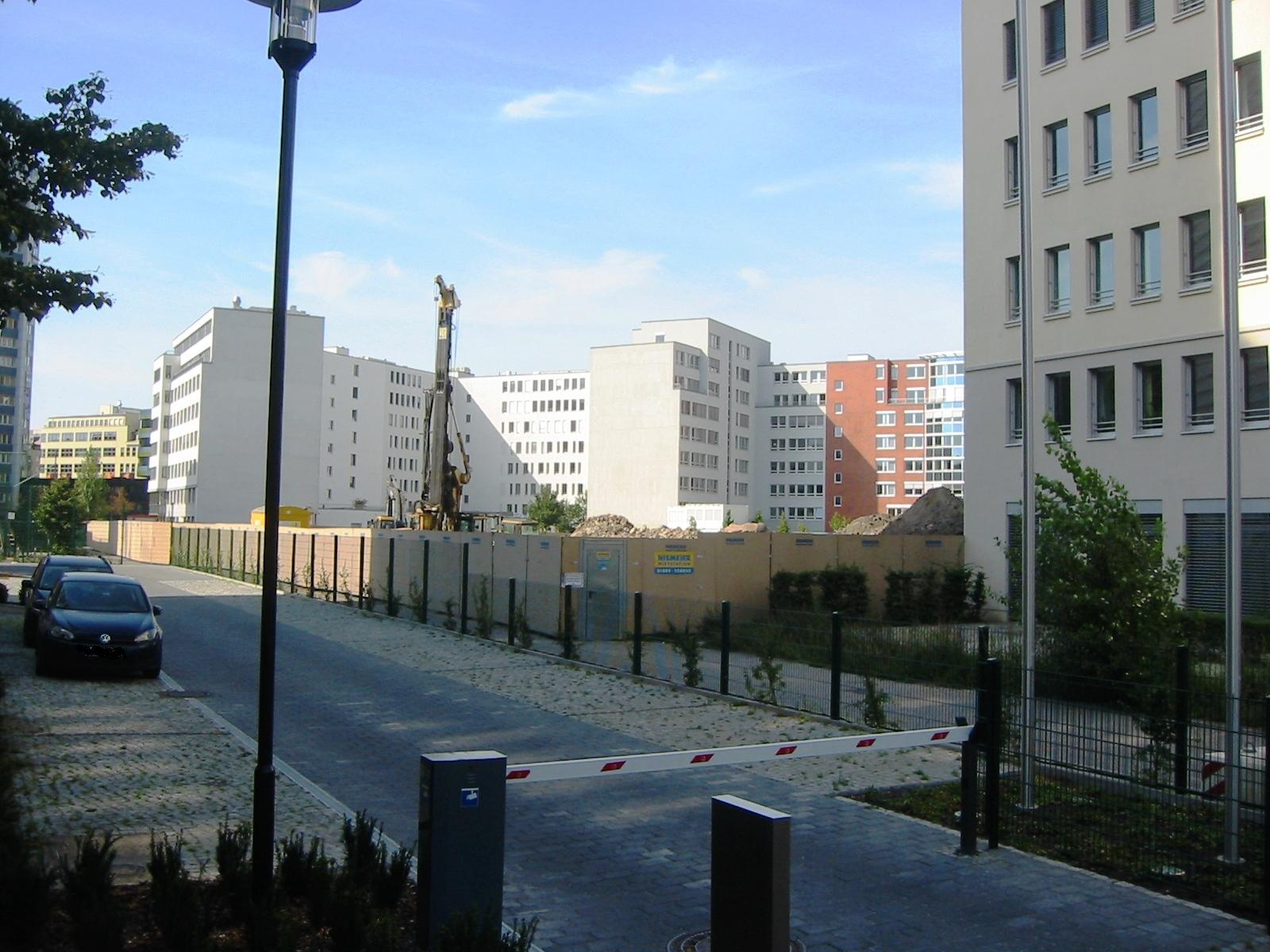 Baustelle am Markgrafenpark zur Erweiterung des dritten, bislang nicht realisierten Bauschnittes hinter dem Gebäude der BKK-VBU-Krankenkasse